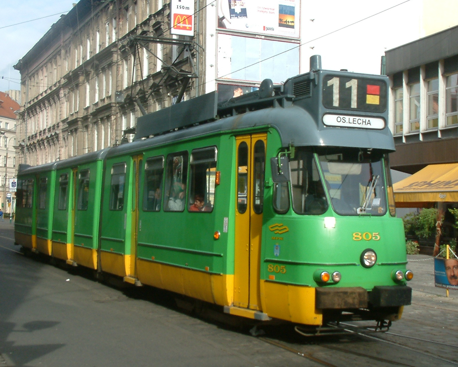 Beijnes 3g on Gwarna Str. in Poznań, Poland.